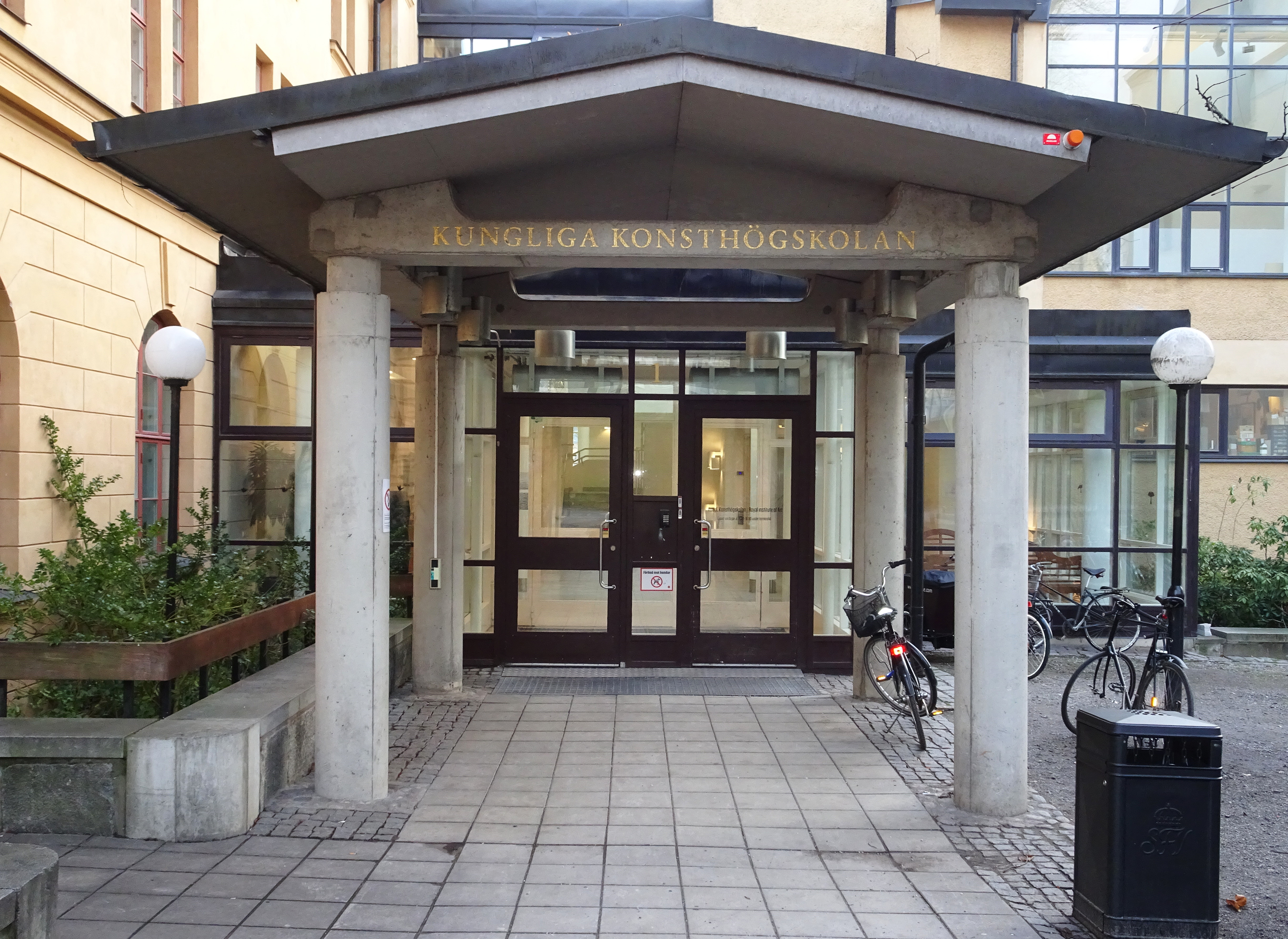 Kungliga Konsthögskolan, entré